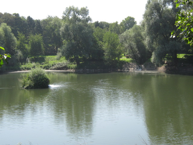 Das so genannte Wuhrloch in Neuenburg (Baden), D. Ein ehemaliger Rheingumpen. Hier mündet der Klemmbach.